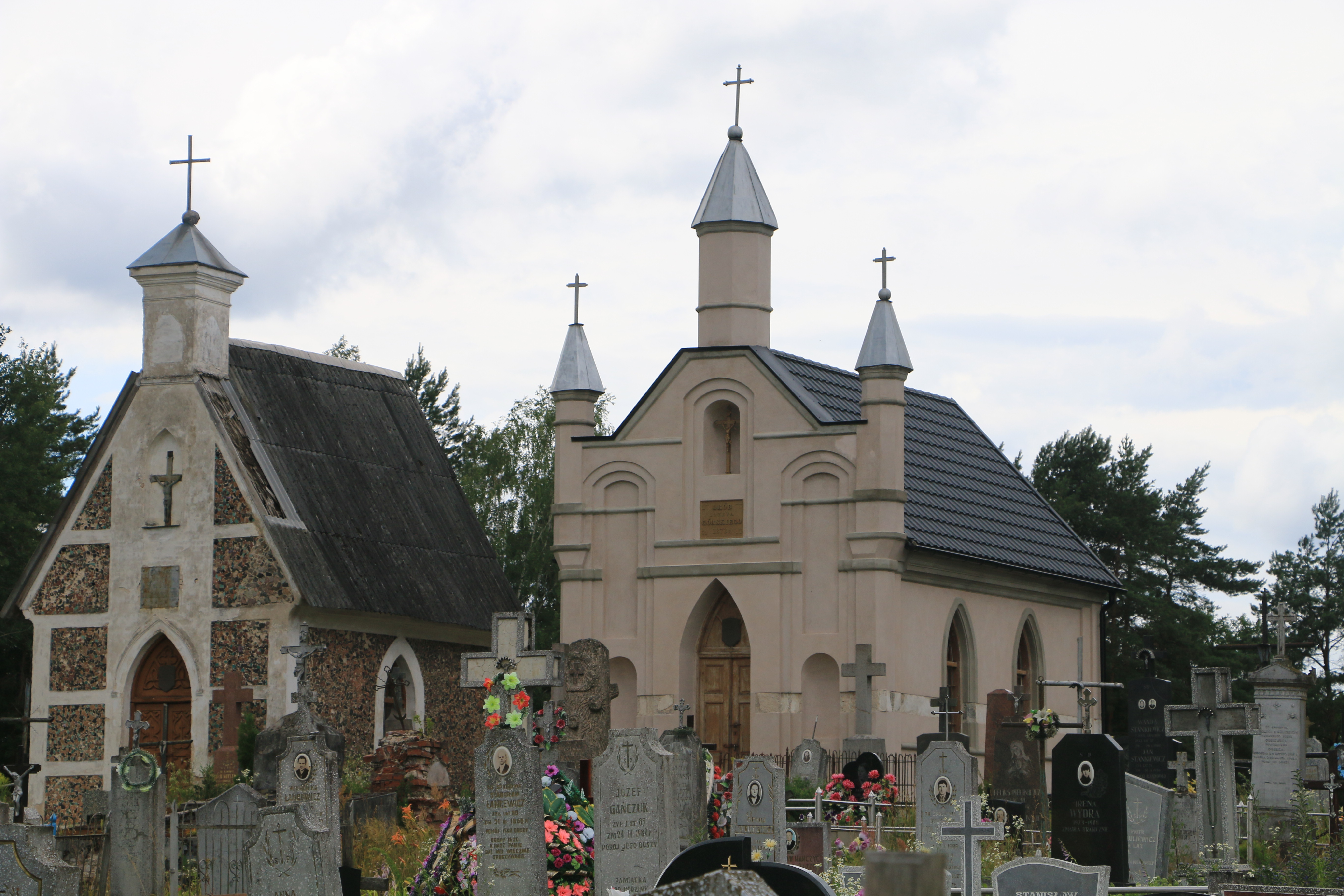 Grodna District, Belarus